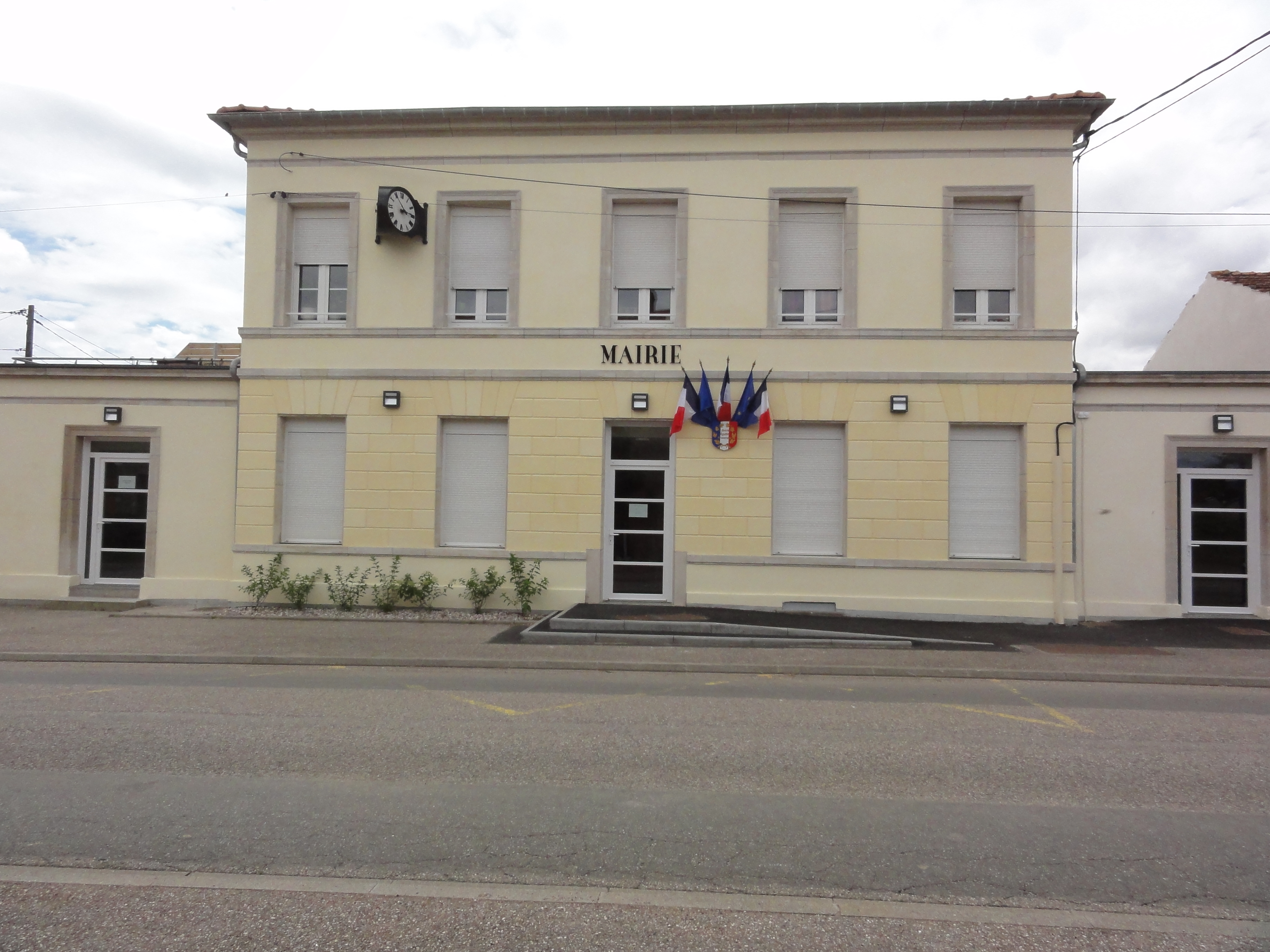 Réméréville (M-et-M) mairie